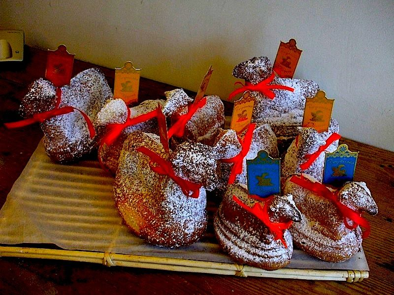 Chez un pâtissier de Strabourg, des Osterlammele, agneau pascal.